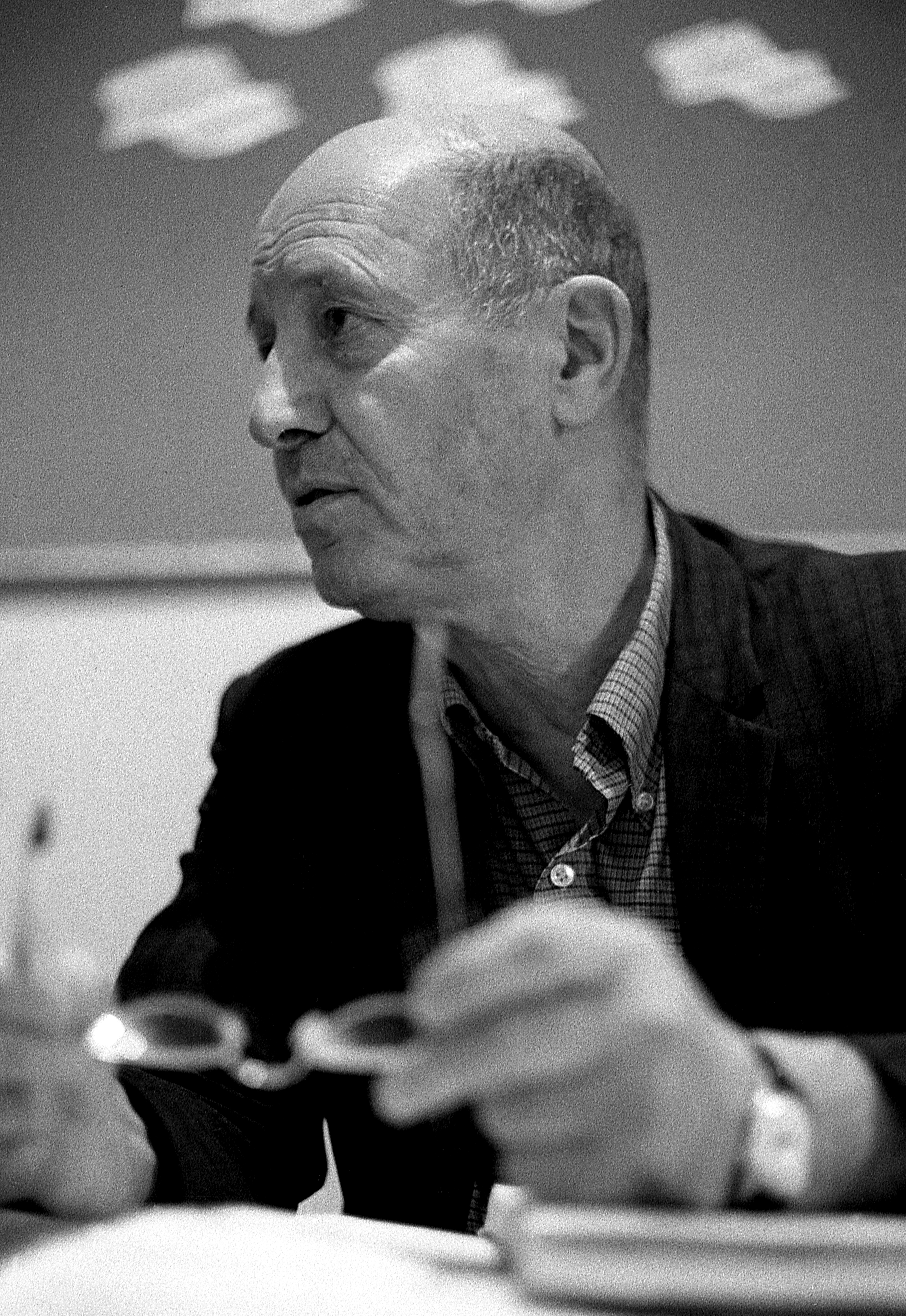 Galerist